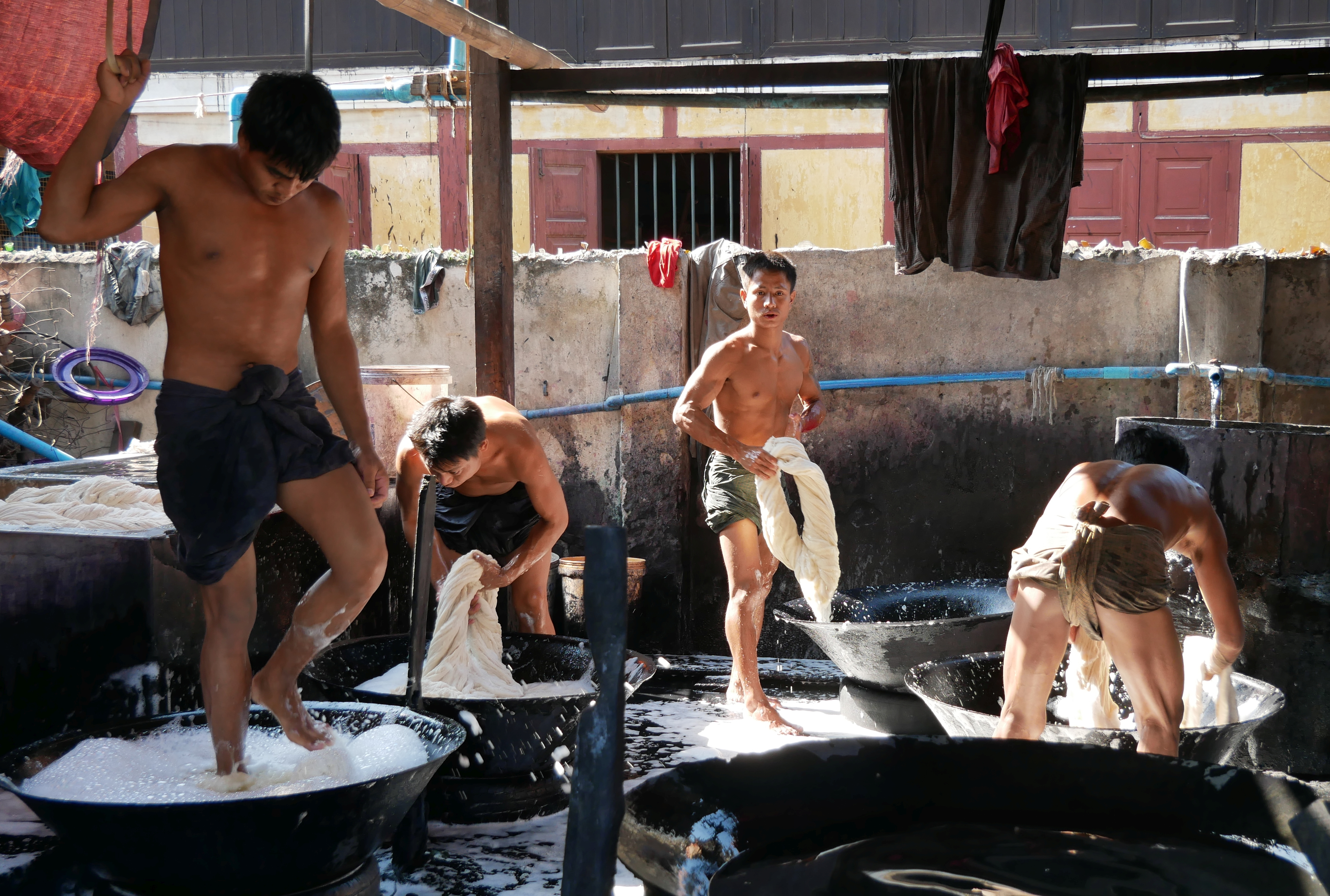 Reinigung von Baumwolle vor dem Färben in einer Manufaktur in Amarapura, Region Mandalay, Myanmar